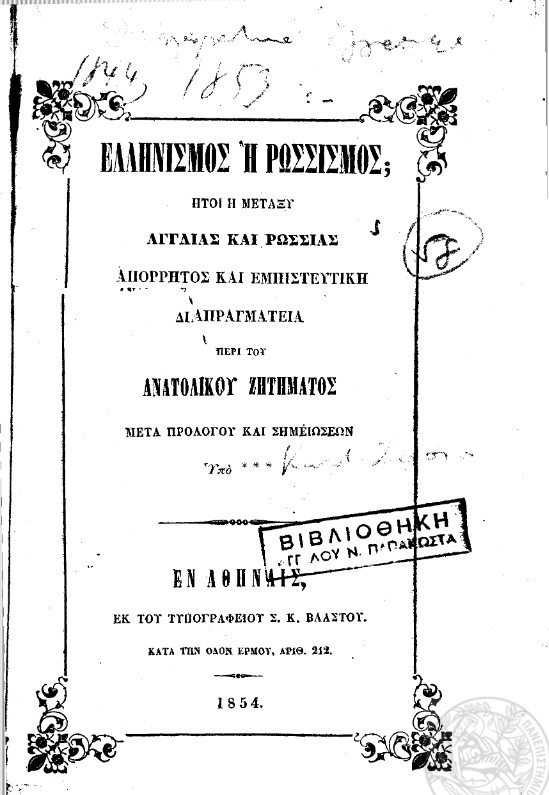 Ελληνισμός ή Ρωσισμός